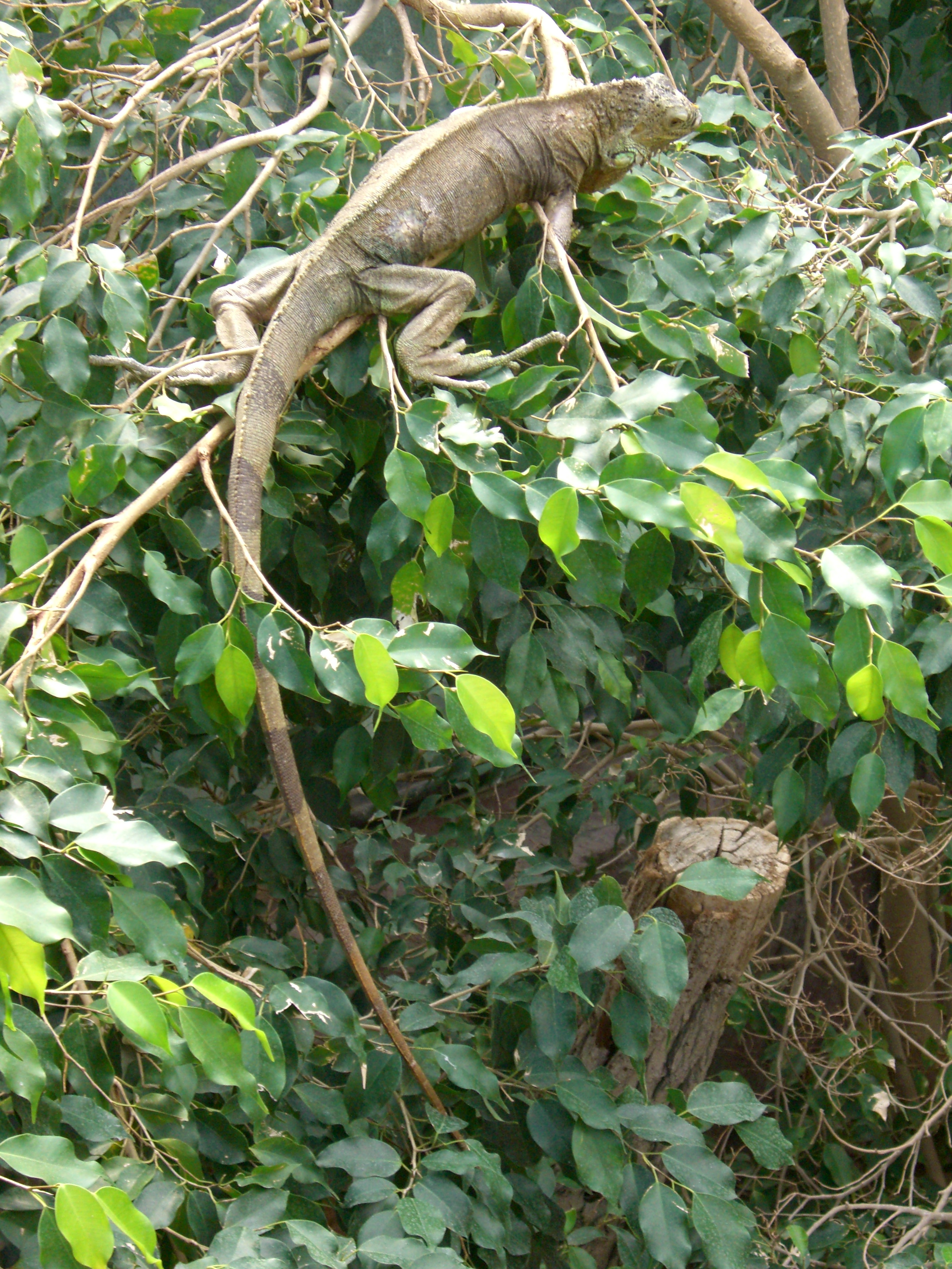 Grüner Leguan im Tierpark Berlin